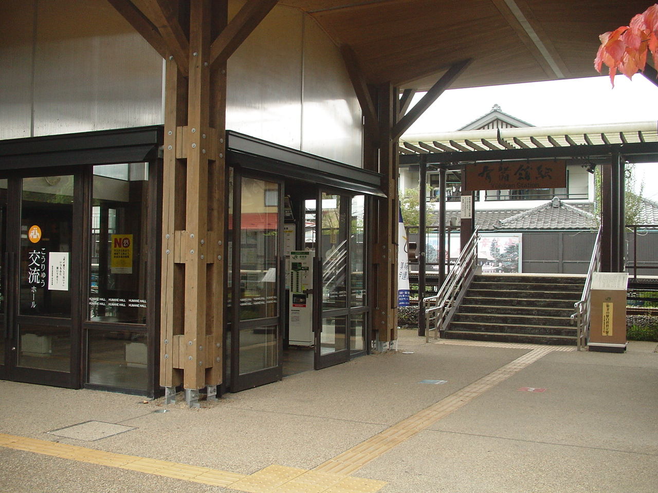 （有備館駅）